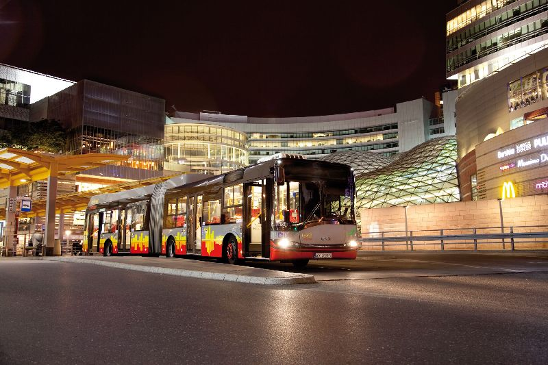 18 Hybrid Allison